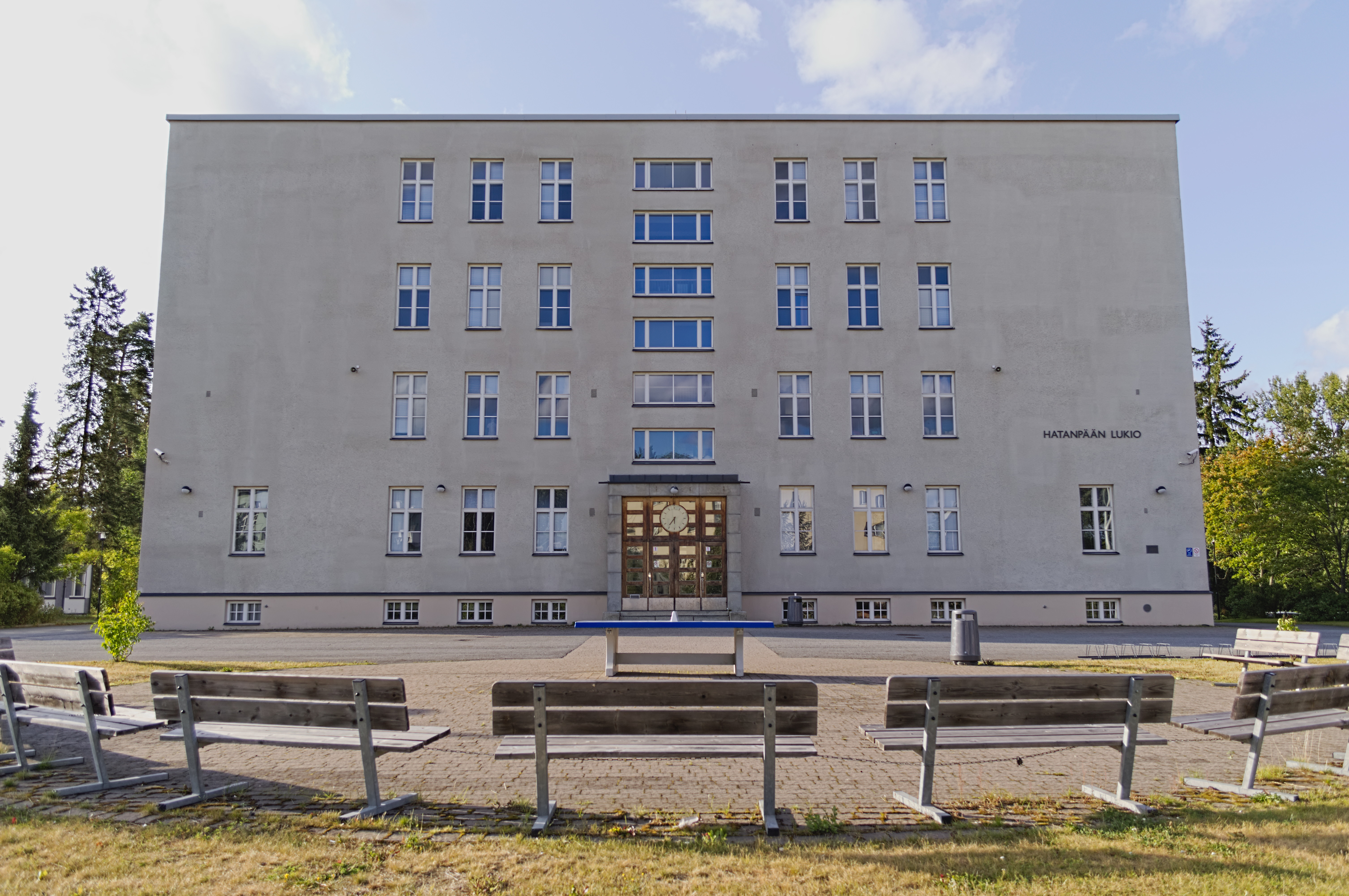 Hatanpään lukion julkisivua